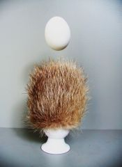 Eierwärmer aus Pelz. Kunstprojekt der Cora Fisch, Berlin.